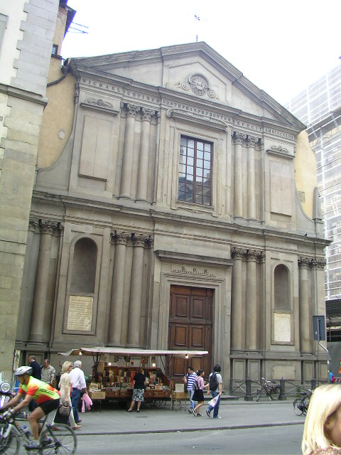 San Giovannino deglio Scolopi church in Florence, Italy